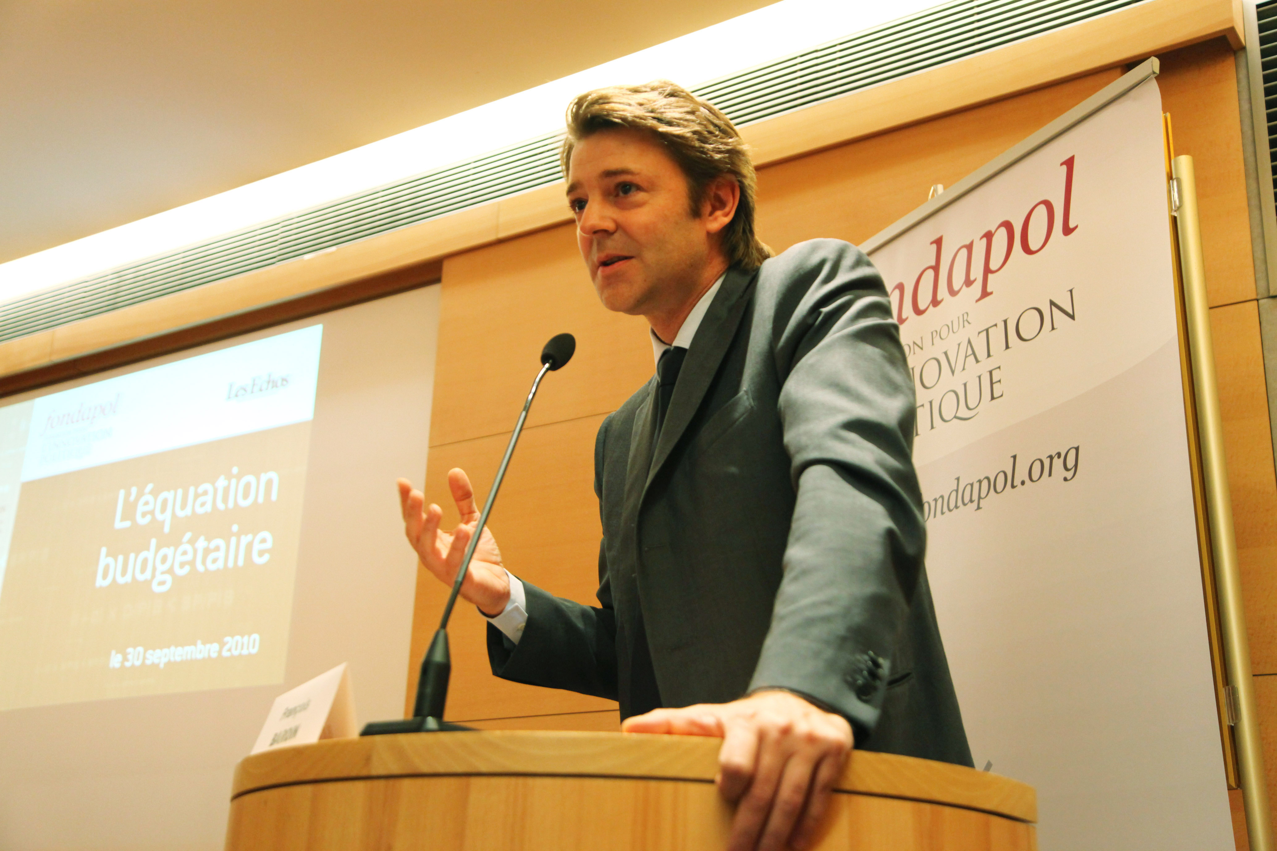 Discours de François Baroin, Ministre du Budget